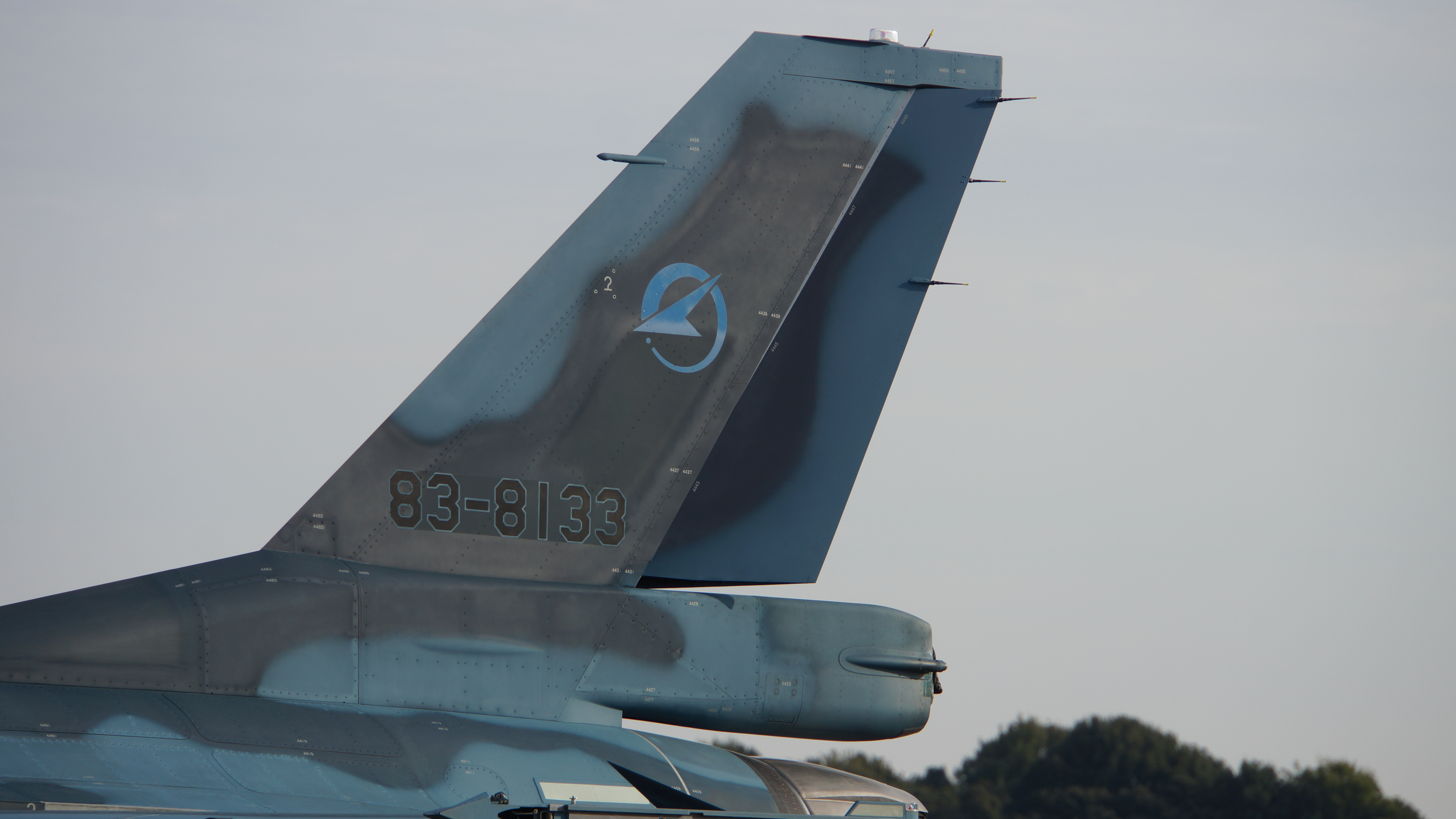 航空自衛隊 F-2B戦闘機（83-8133号機） 垂直尾翼。2016年10月30日 岐阜基地にて。